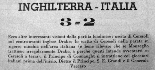 Didascalia de Il Calcio Illustrato